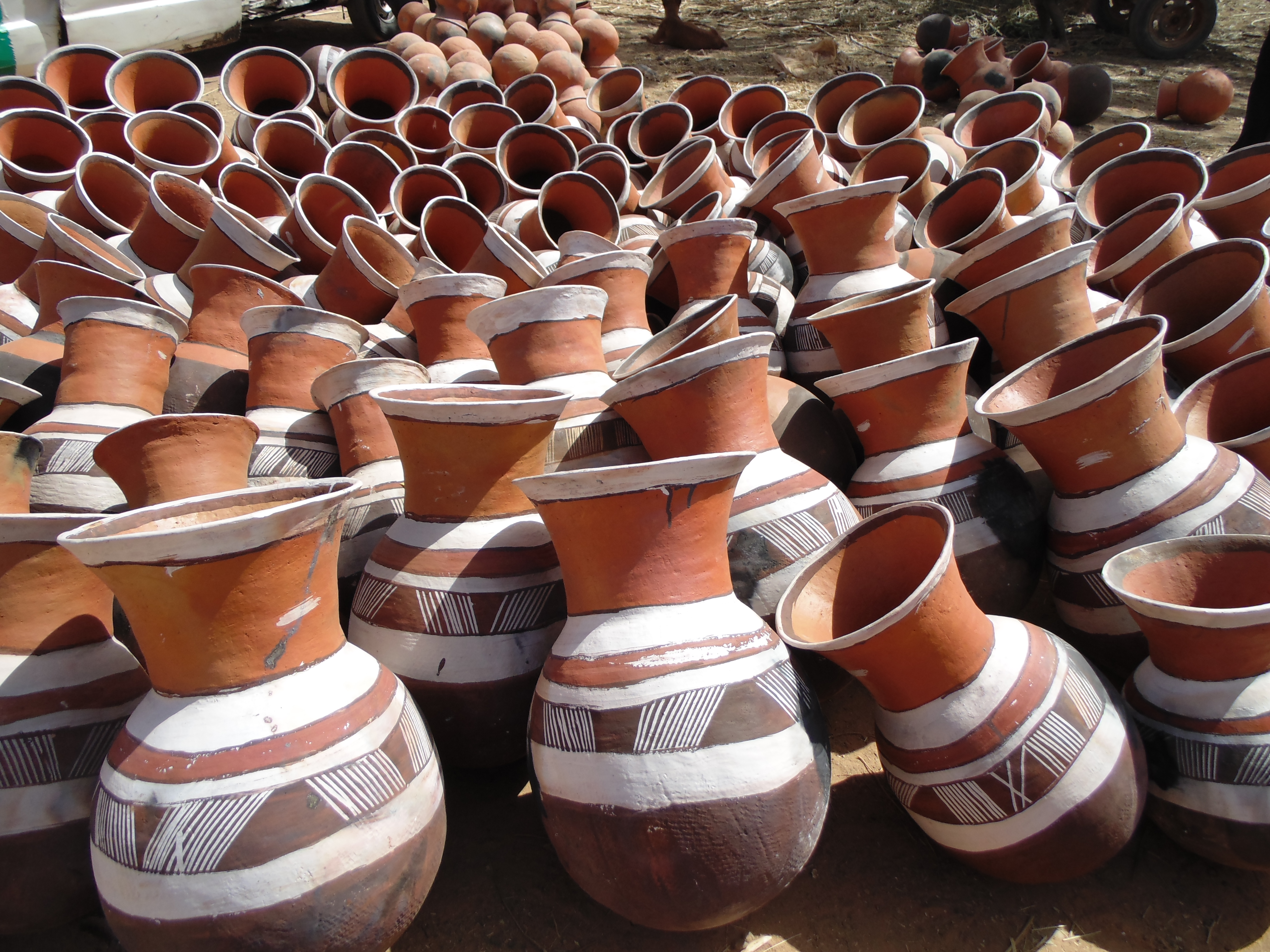 Wikichallenge 2019